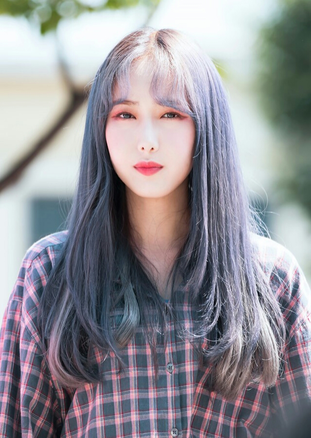 Hwang SinB no Music Center Mini Fanmeeting em 21 de julho de 2018